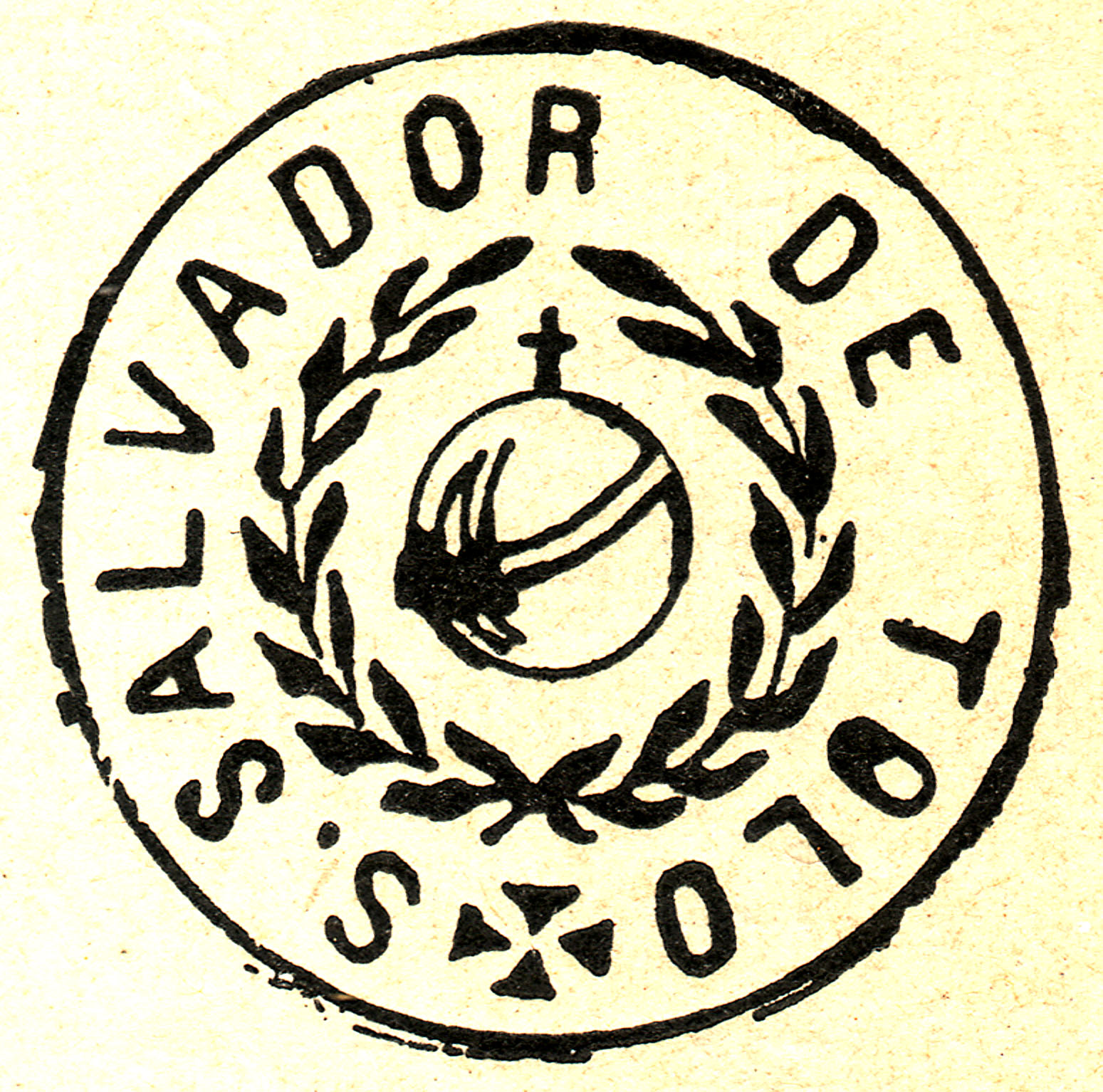 Escut municipal de Sant Salvador de Toló (Gavet de la Conca, Pallars Jussà)